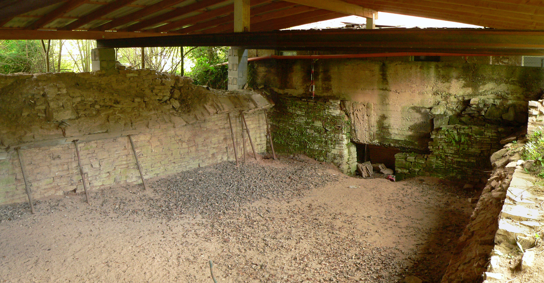 Altes Brennhaus in Fürstenberg, Ausgrabungsstelle der Brennöfen unter einem schützendem Blechdach